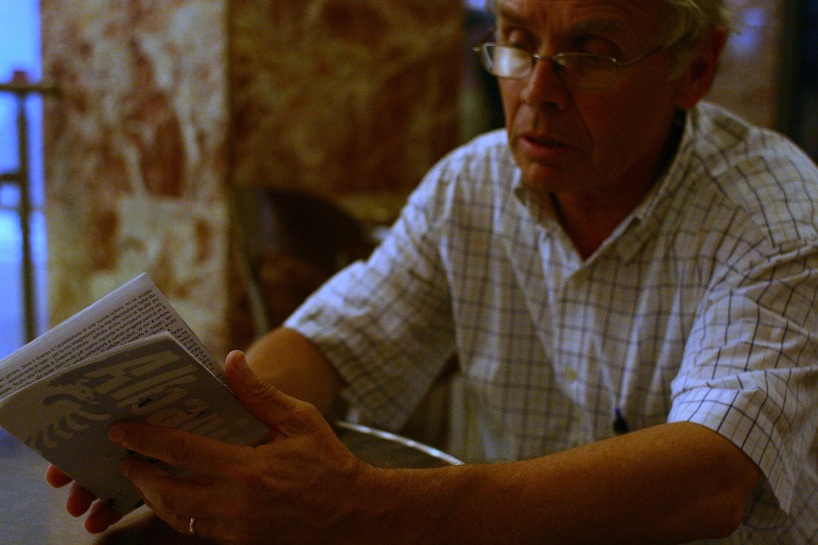 Kristaq Mitro, Tirana